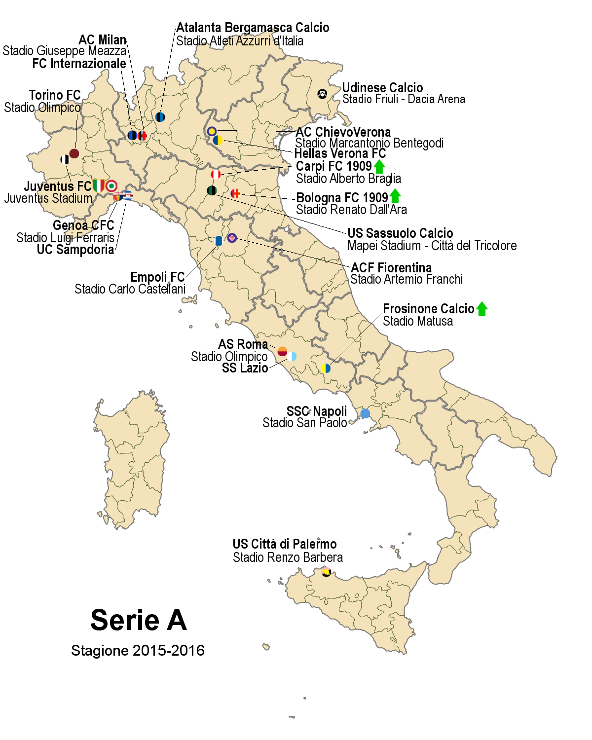 Ubicazione delle squadre di calcio della Serie A 2015-2016